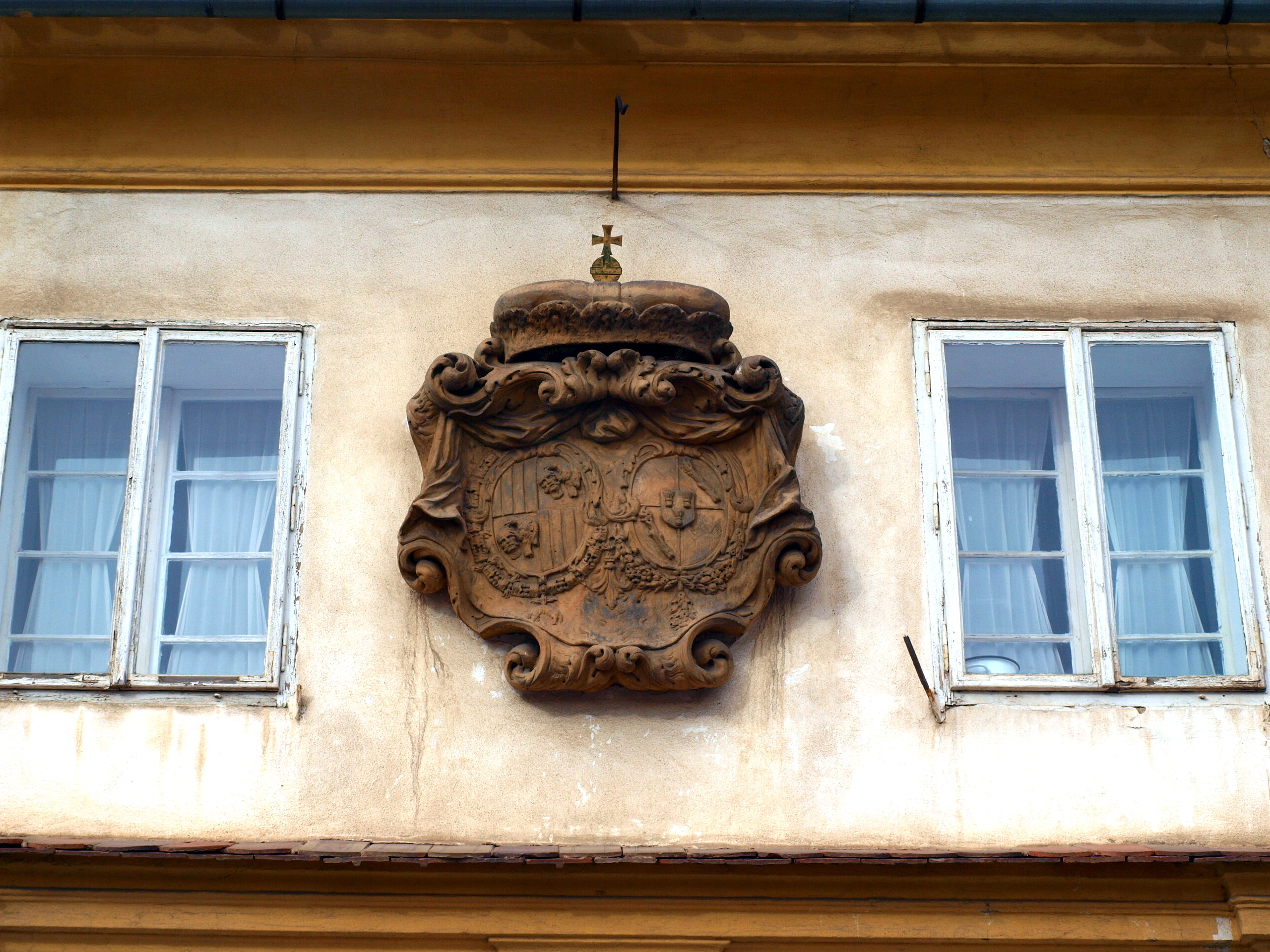 Jinonický schwarzenberský zámek